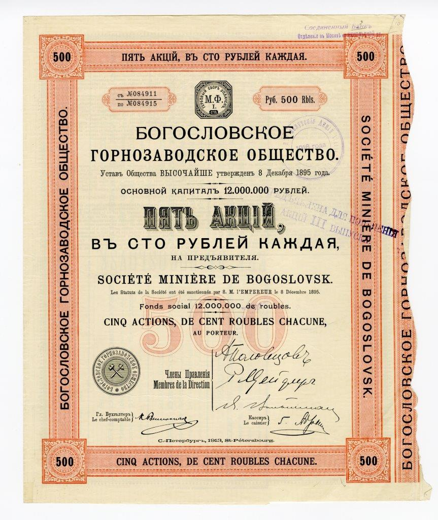 5 акций на предъявителя в 100 руб. каждая Богословского горнозаводского общества с основным капиталом в 12 млн. руб. С-Петрбург, 1913 г.